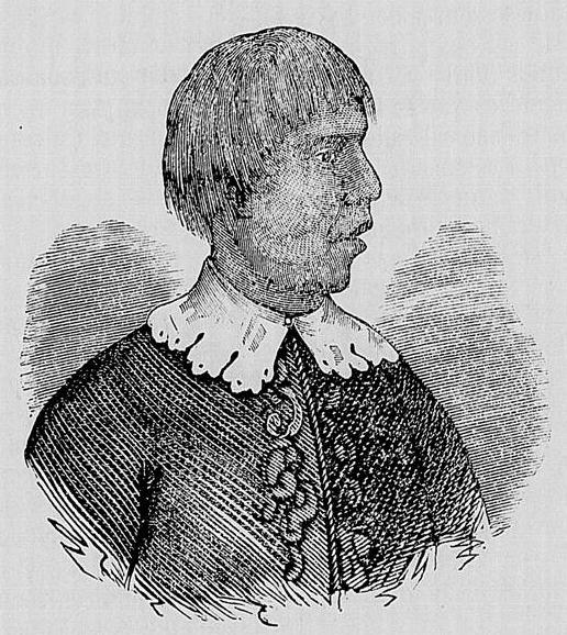 Martim Affonso, Ararygboia (cobra feroz), chefe dos Trimininós.